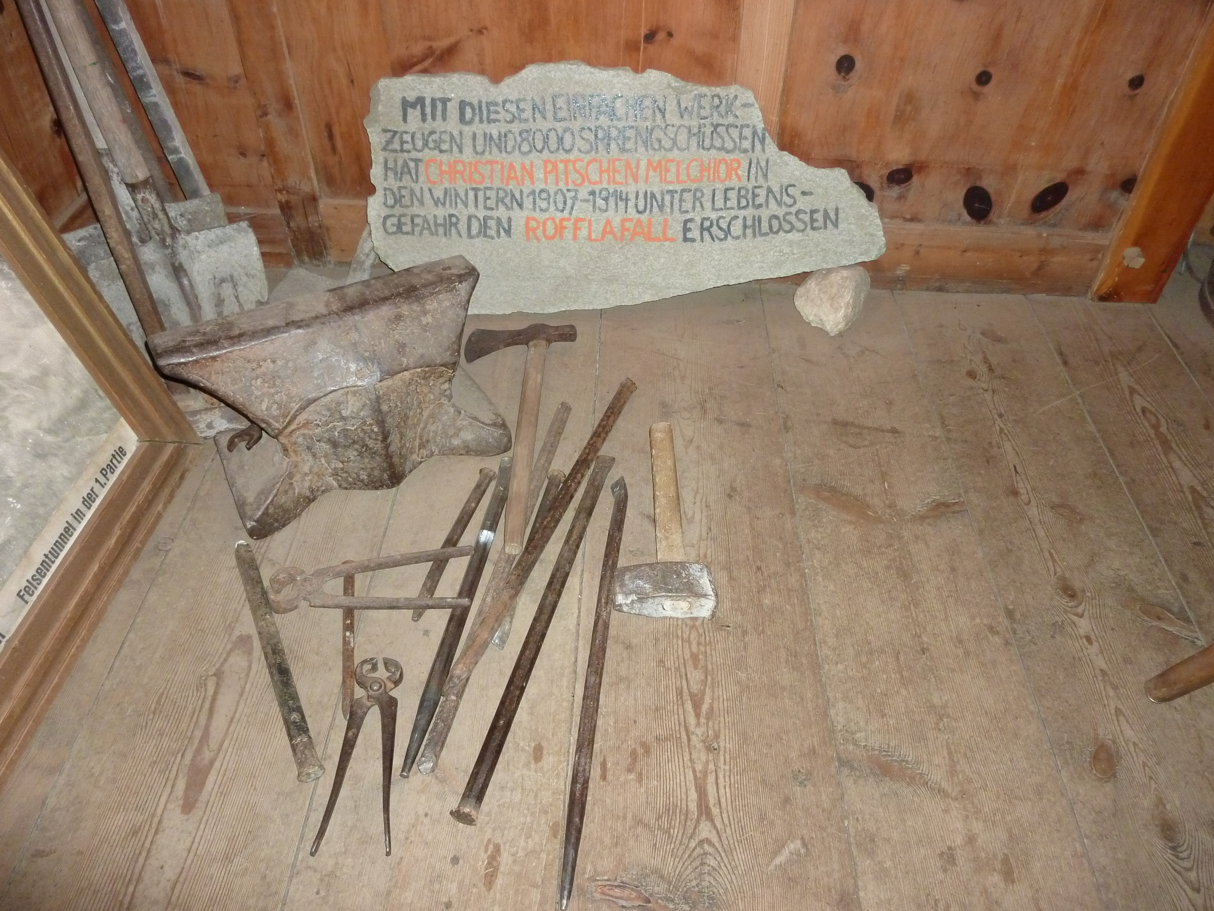 Rofflaschlucht: Werkezeuge